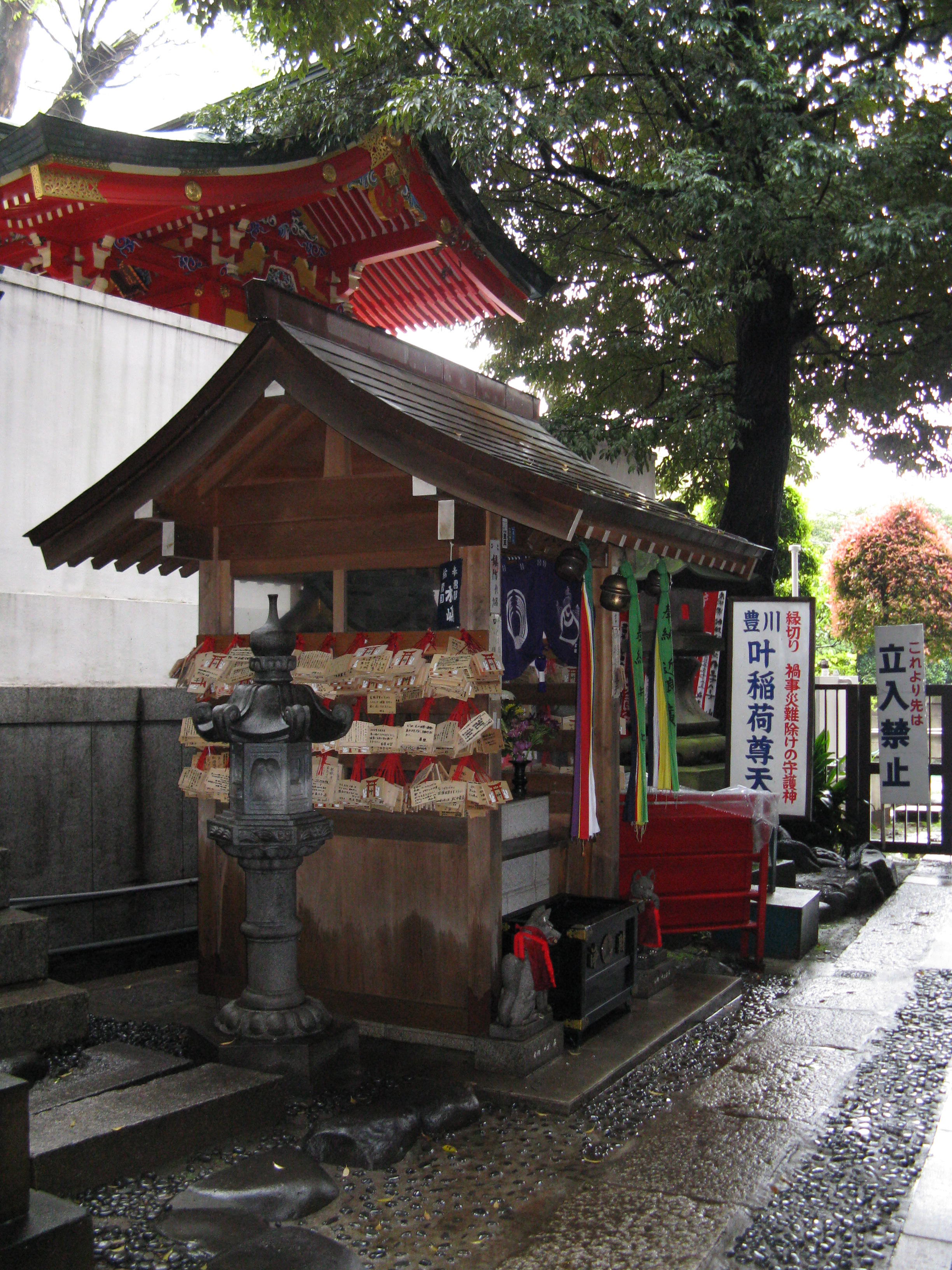 豊川稲荷東京別院 叶稲荷尊天